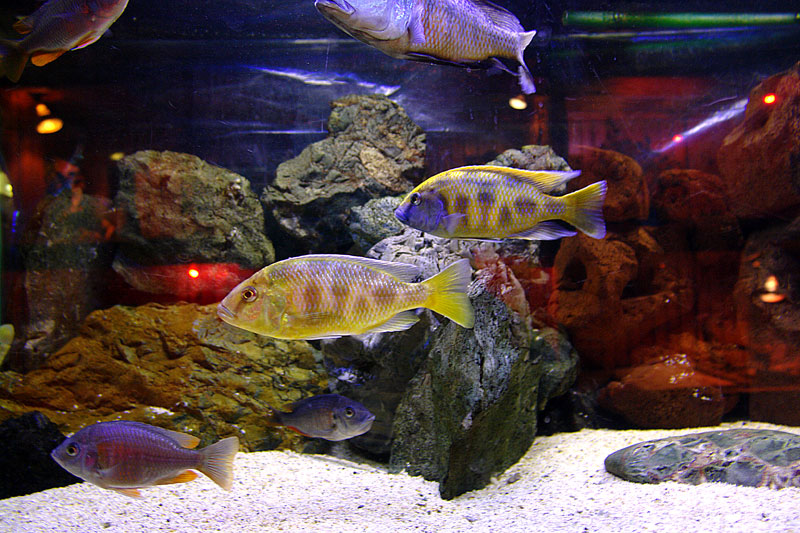 حوض اسماك زينه من الصدع الأفريقي.